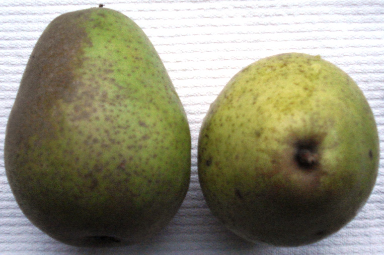 Pyrus - Alexander Lukas